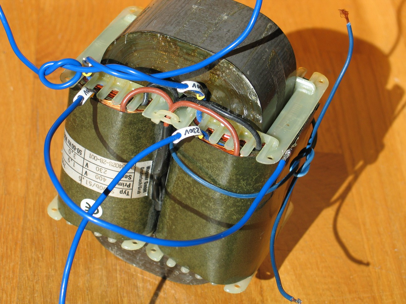 Bild von Schnittbandkerntrafo